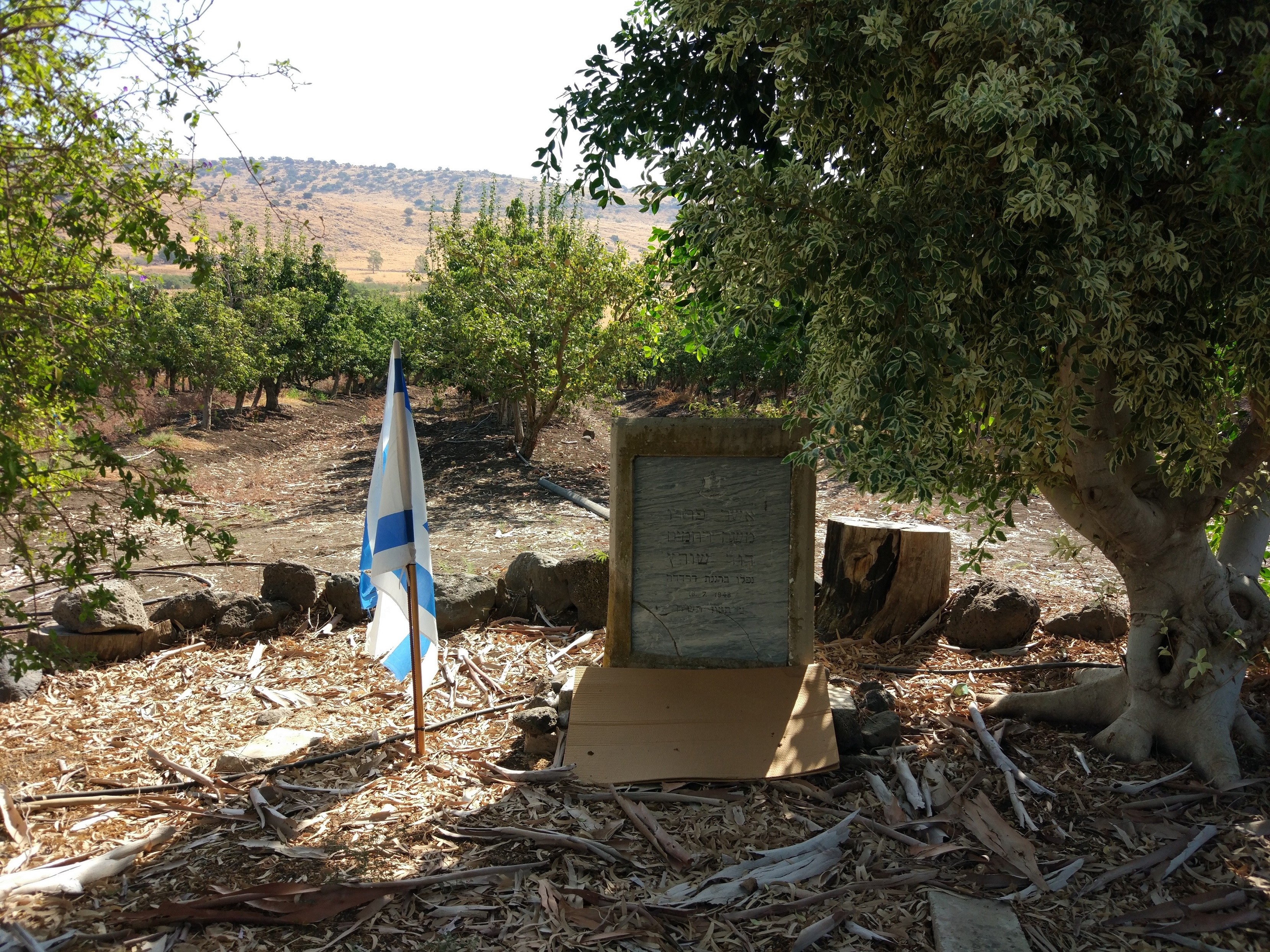 אנדרטה לזכר חברי קיבוץ אייל שנפלו בדרדרה במלחמת העצמאות